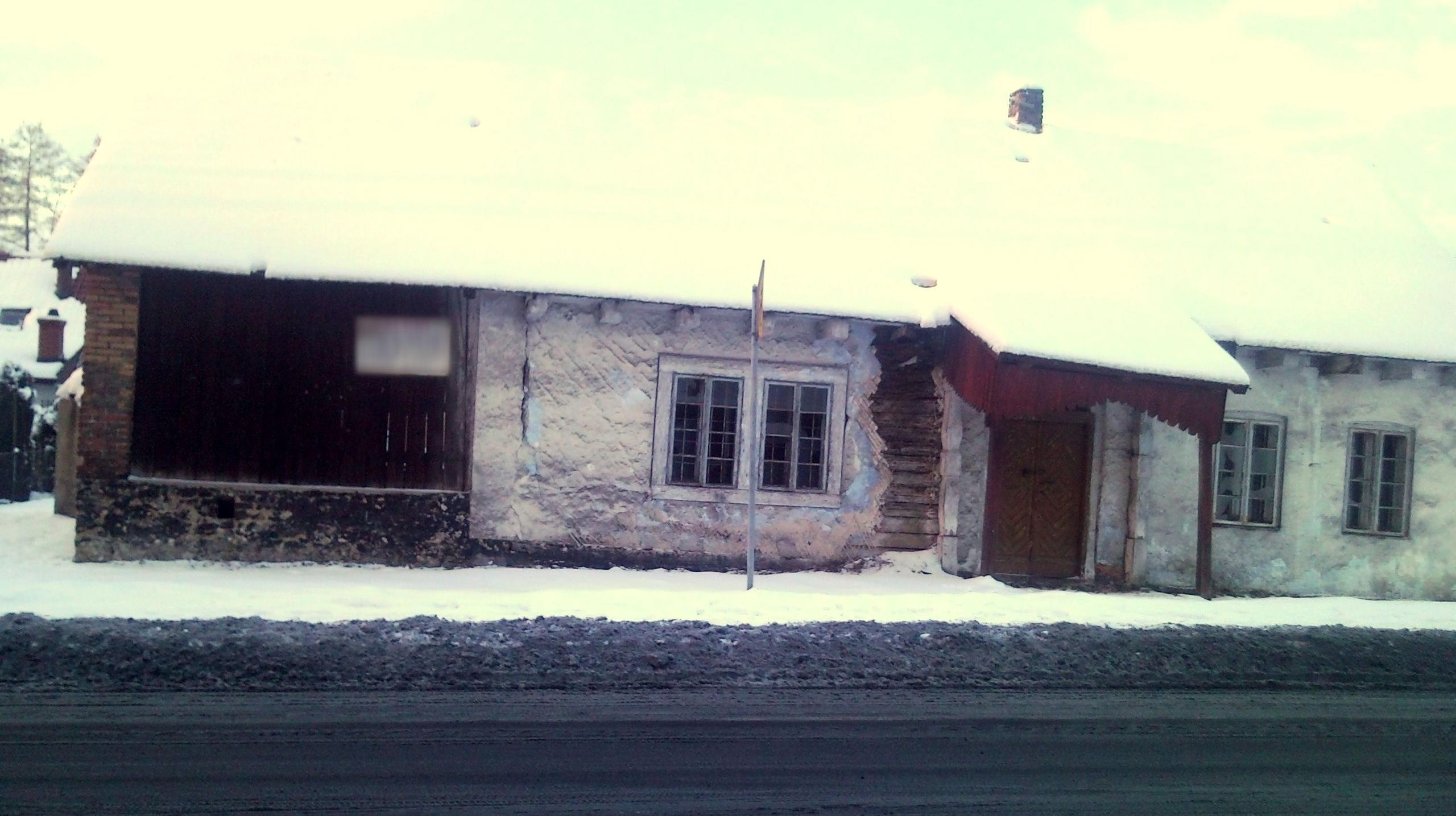 Rączna Dom Ciotki Packi zimą